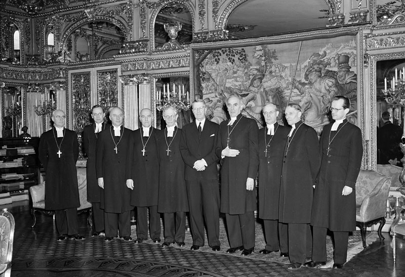 Interiör från Kungliga slottet. Nio biskopar besöker kung Gustaf VI Adolf. Jonzon, Bengt. Cullberg, John. Björkquist, Manfred. Runestam, Arvid. Malmeström, Elis. Giertz, Bo. Hultgren, Gunnar. Aulén, Gustaf. Brilioth, Yngve. Fr. v. E. Malmeström, G. Hultgren, J. Cullberg, B. Jonzon, G. Aulén, Y. Brilioth, A. Runestam, M. Björkquist och B. Giertz